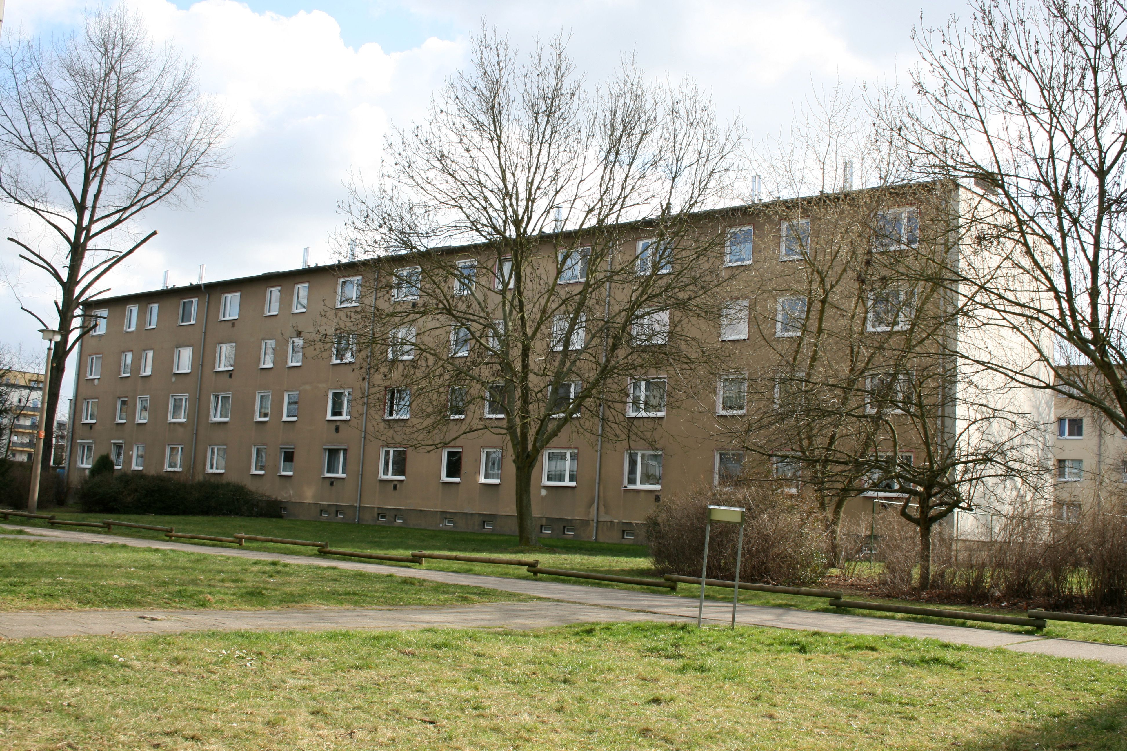 Q3A Plattenbau (Back), Falkenberger Str., Berlin, Germany